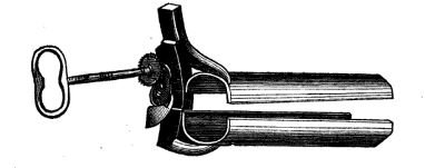 Spéculum de Template:Mme